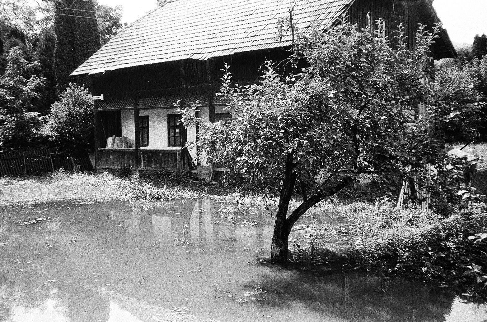 підтоплення